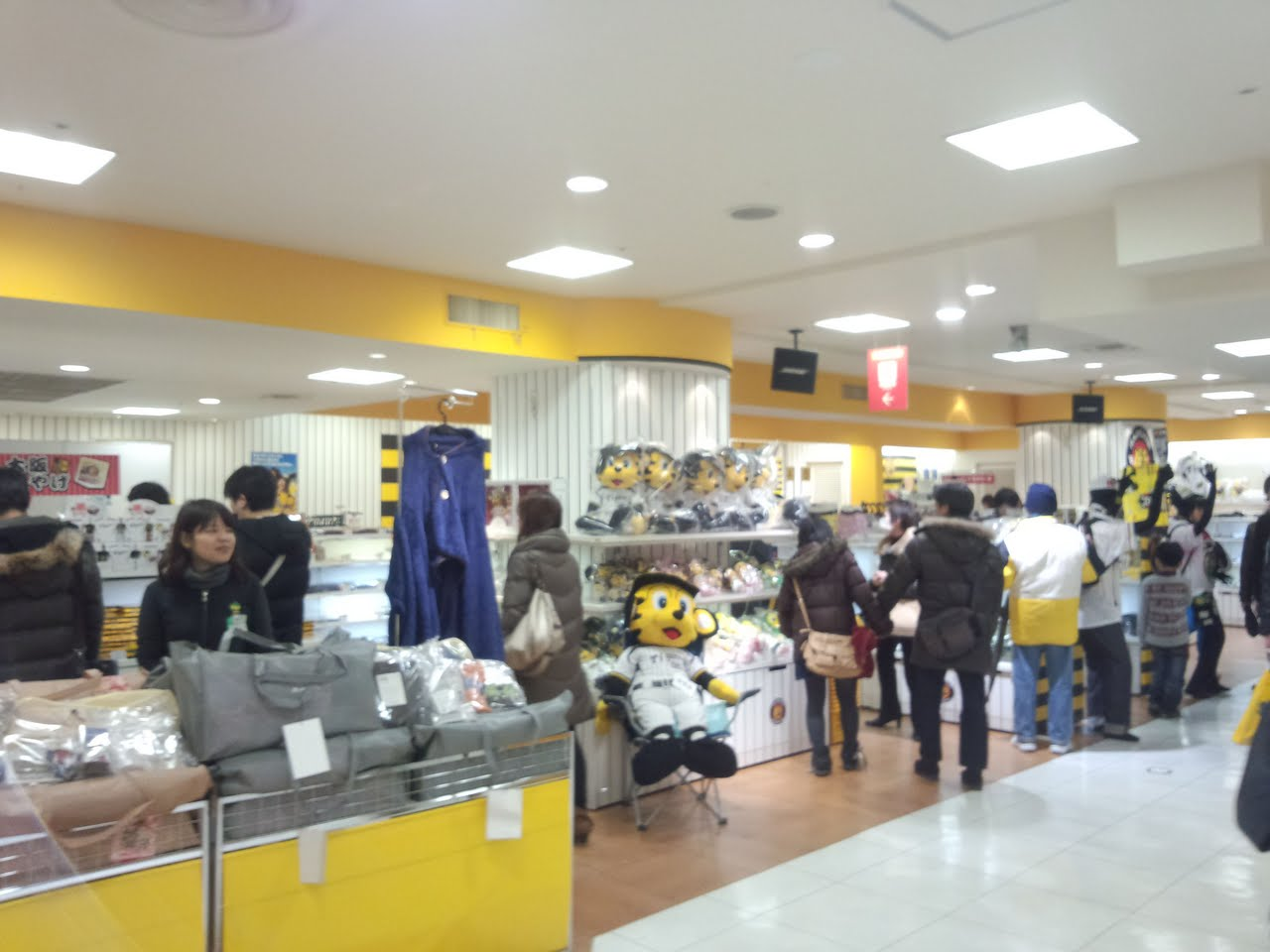 大阪梅田の阪神百貨店梅田本店8階にある、阪神タイガースショップ